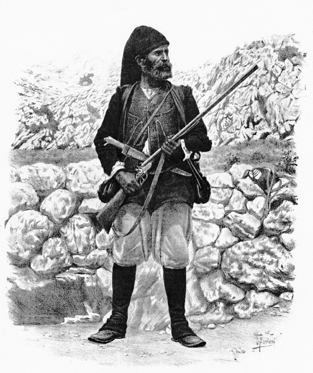 Giovanni Corbeddu Salis, il "Re della macchia" - criminale della Barbagia, Sardegna centrale